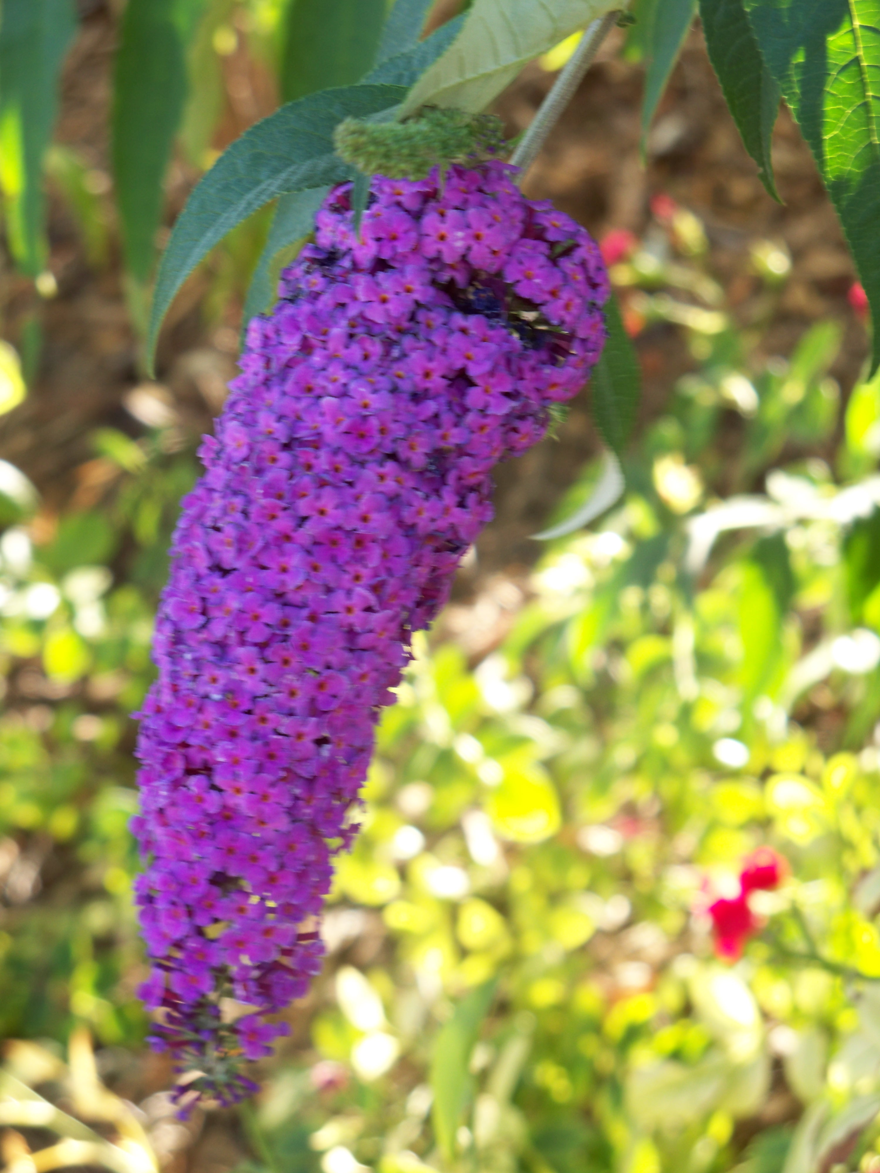 Fleur de Buddleja